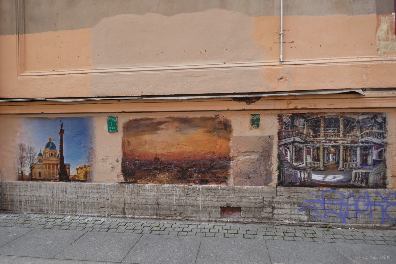 Галерея Urbanfresco